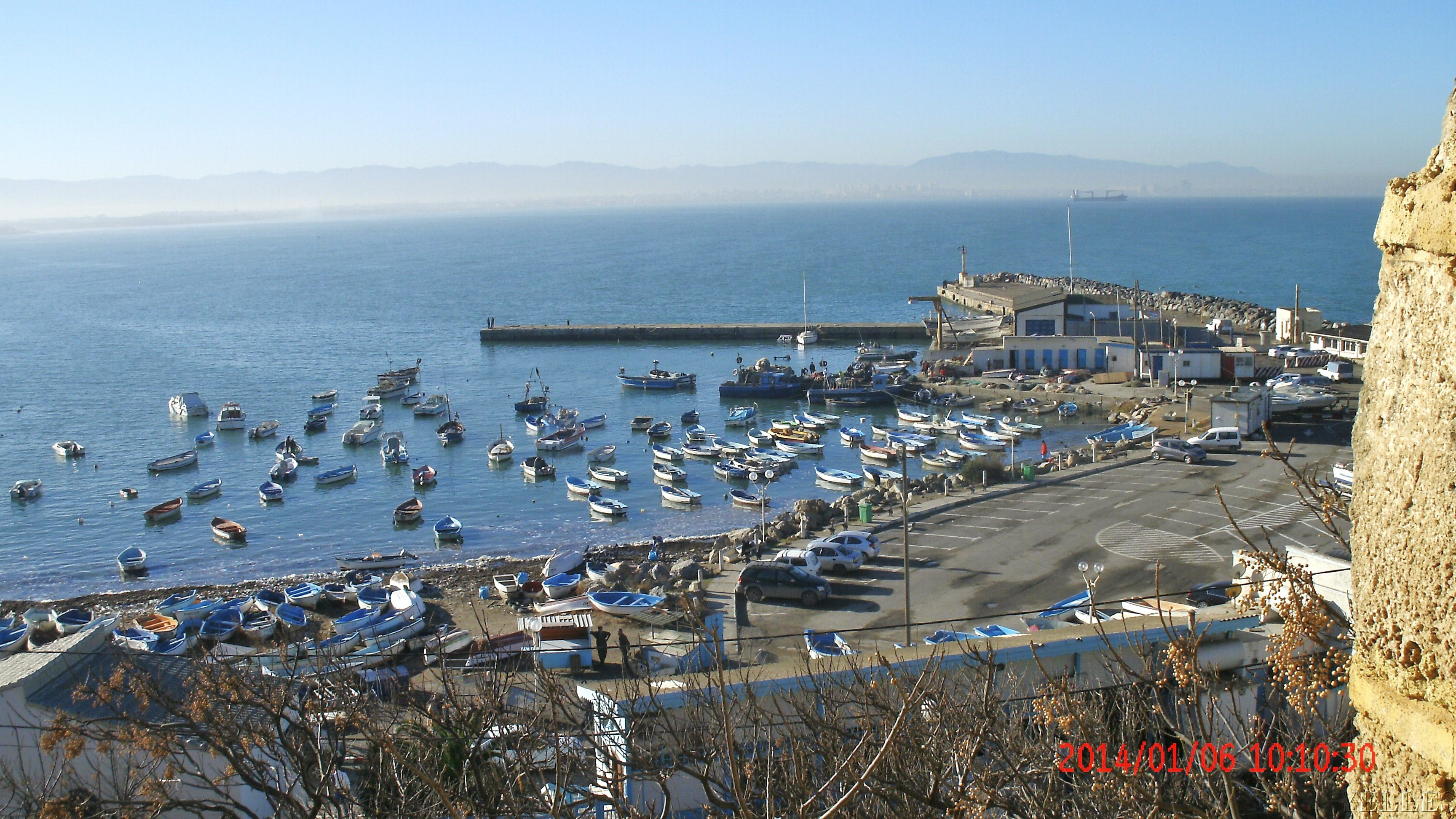 Le port de Tamentfoust